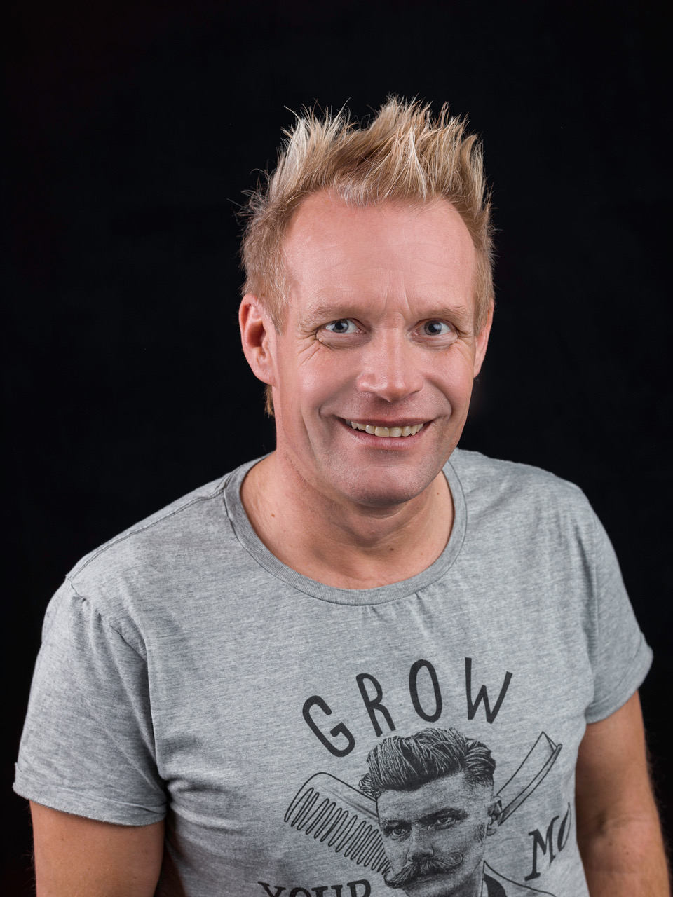 lizensiertes Pressefoto Peter Löhmann